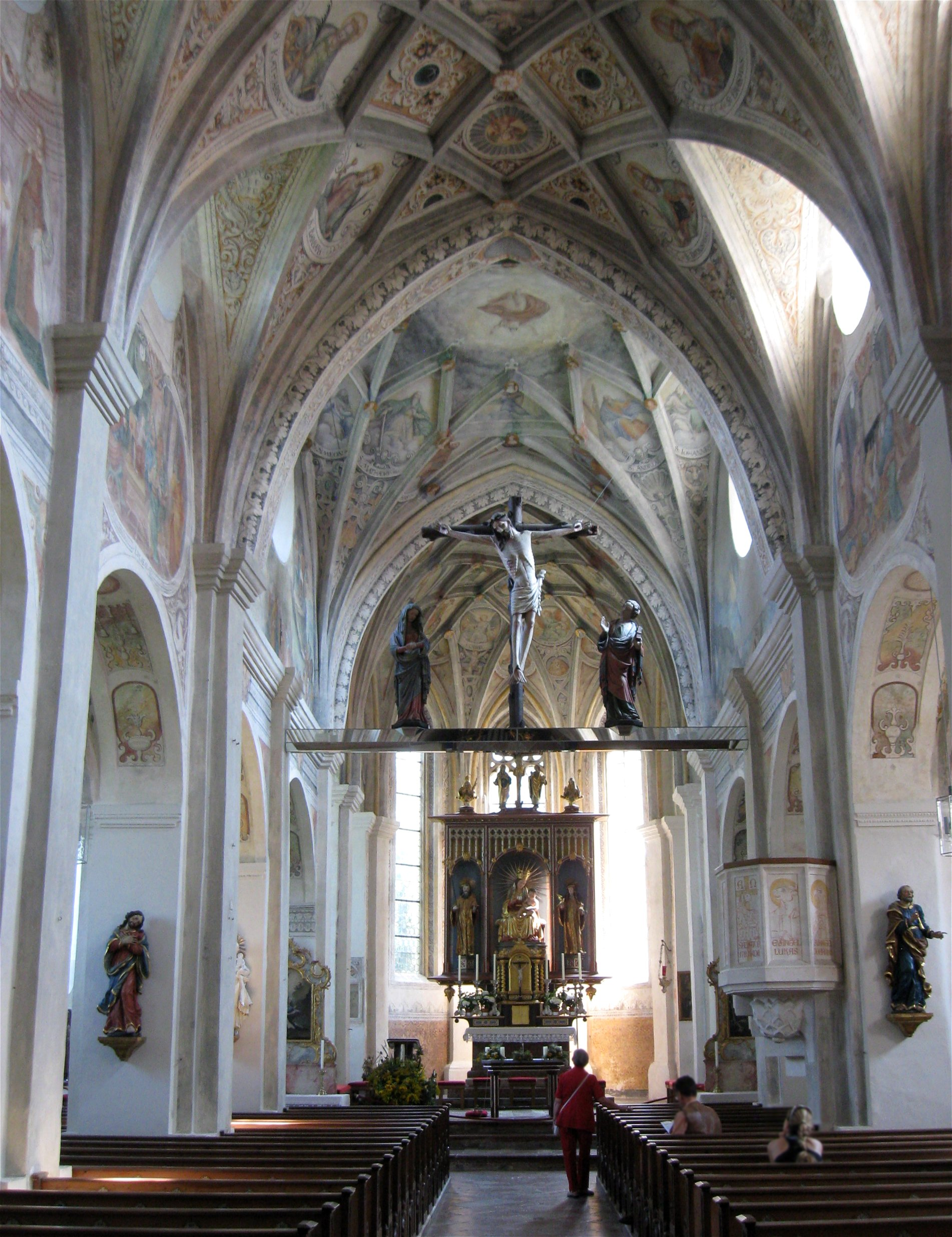 Klosterseeon, Klosterweg 4; Pfarrkirche St. Lambert, ehemalige Benediktinerklosterkirche, im Kern romanische Säulenbasilika, Grundmauern und Türme zum Teil noch 11./12. Jahrhundert, großer Umbau mit Einwölbung des Langhauses 1425-33 durch Konrad und Oswald Bürkel, weitere bauliche Veränderungen nach Brand von 1561, Kuppeldächer der Türme nach 1561; mit Ausstattung.